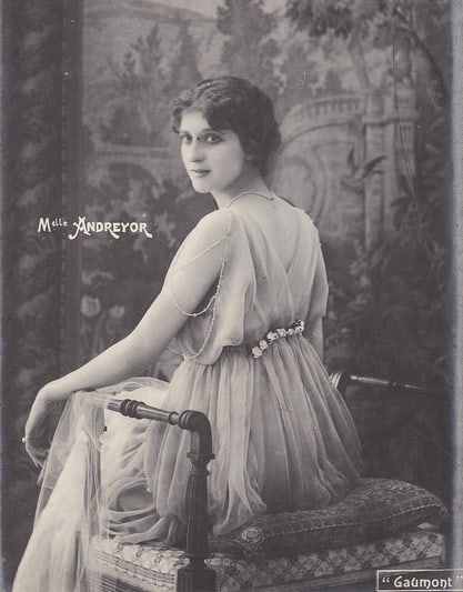 Yvette Andreyor dans Judex, carte postale, 1916.